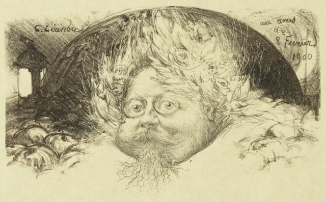 Autoportrait pour un banquet - Lithographie sur papier vélin